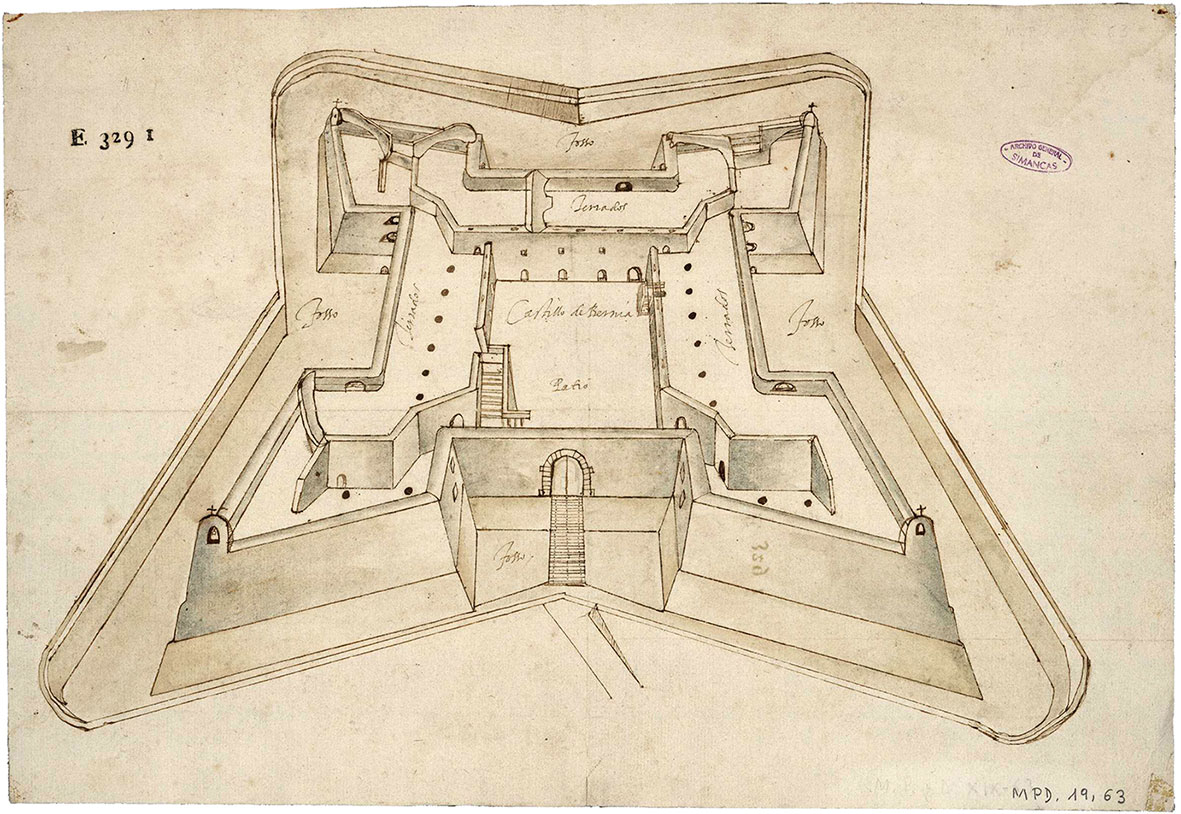 Perspectief van het fort Bernia (1563) getekend door Giovanni Battista (Juan Bautista) Antonelli